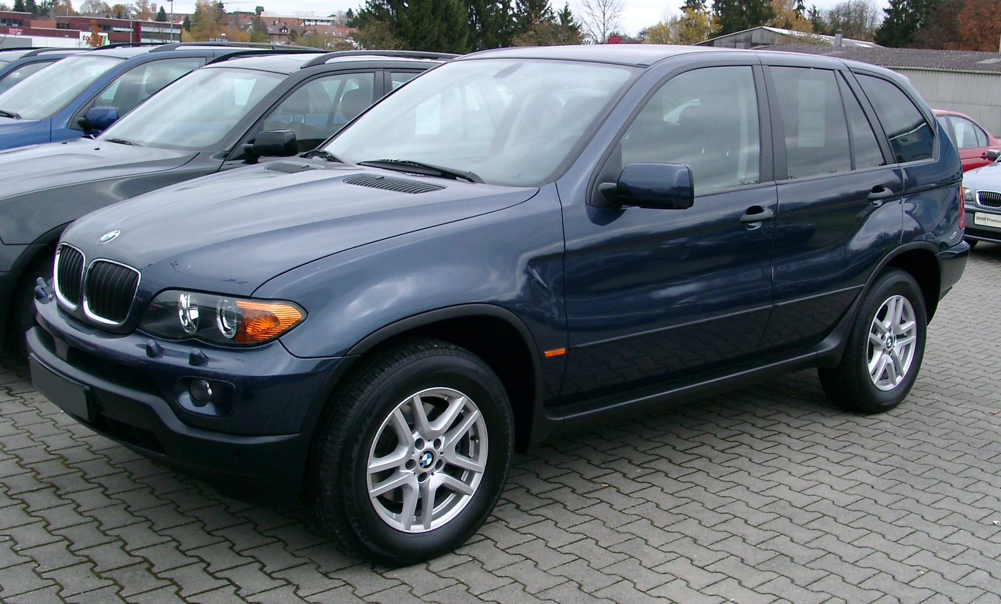 BMW X5 (E53)